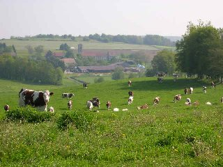 Village de Villars-le-Sec (Territoire de Belfort) Le village et les vaches. Photo prise en mai 2004 par LP90